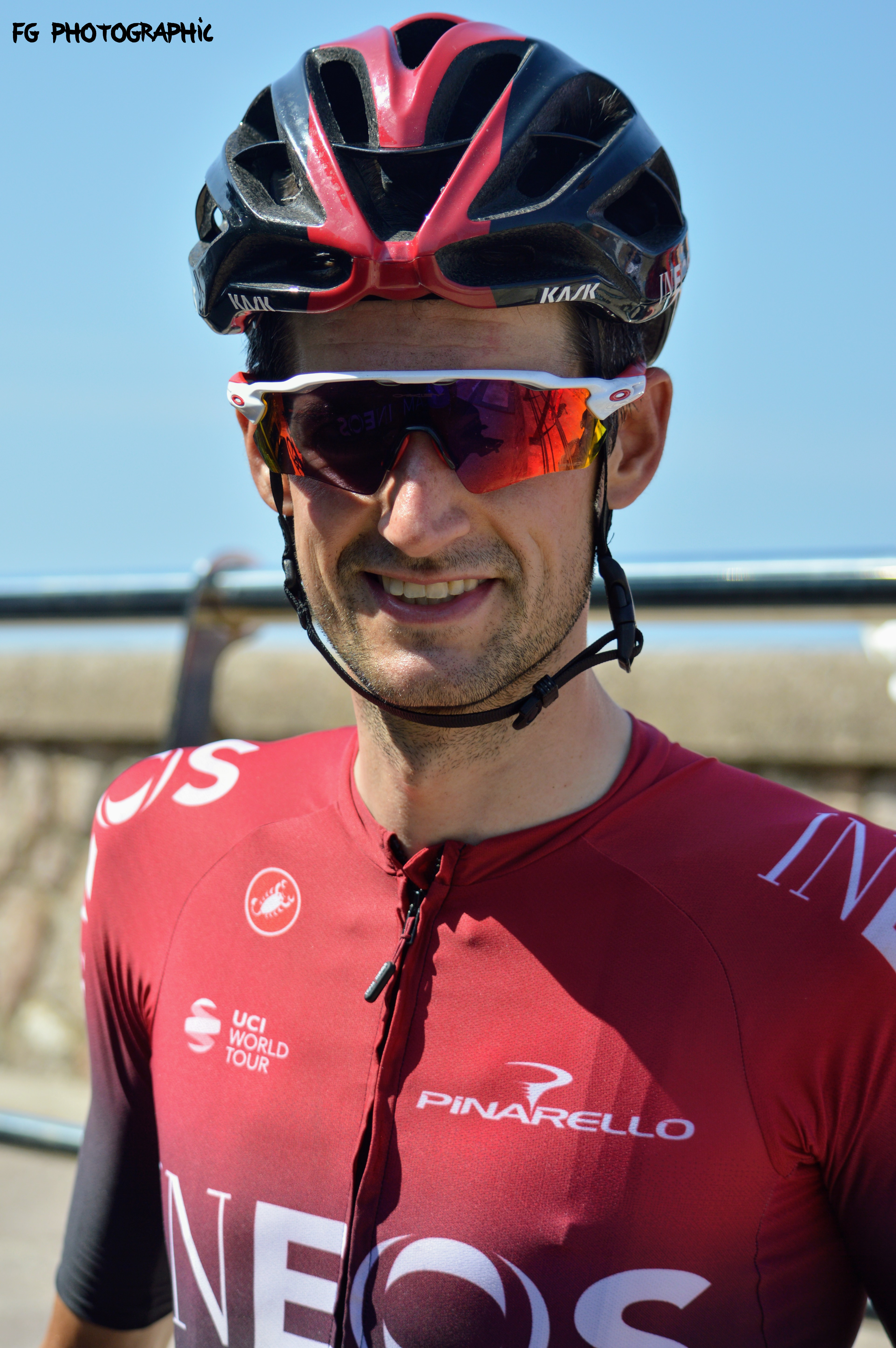 Wout POELS - Août 2019 (Clasica San Sebastian)